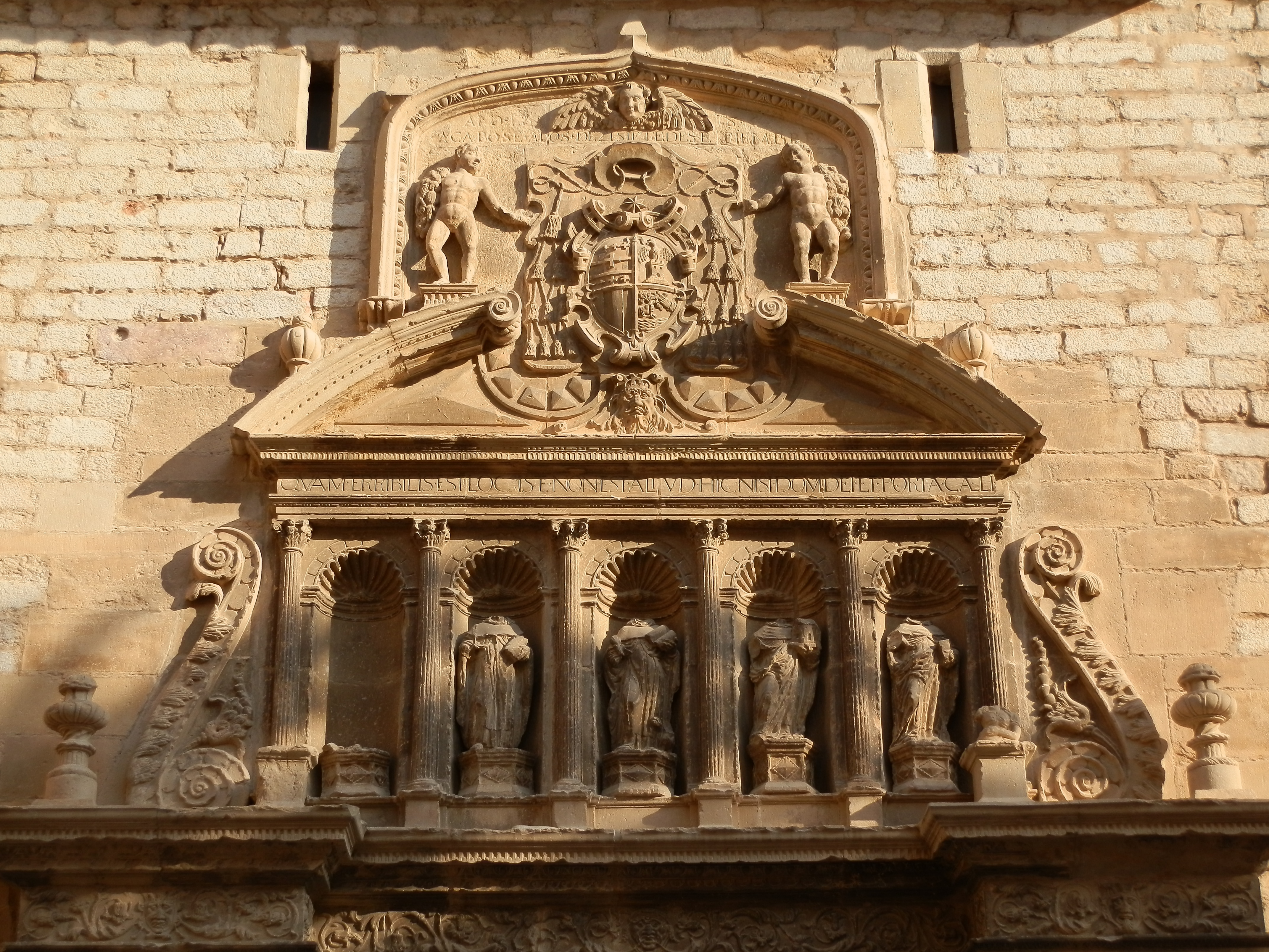 Detalle de las esculturas decapitadas y del escudo obispal que coronan la puerta de la iglesia de Santo Domingo